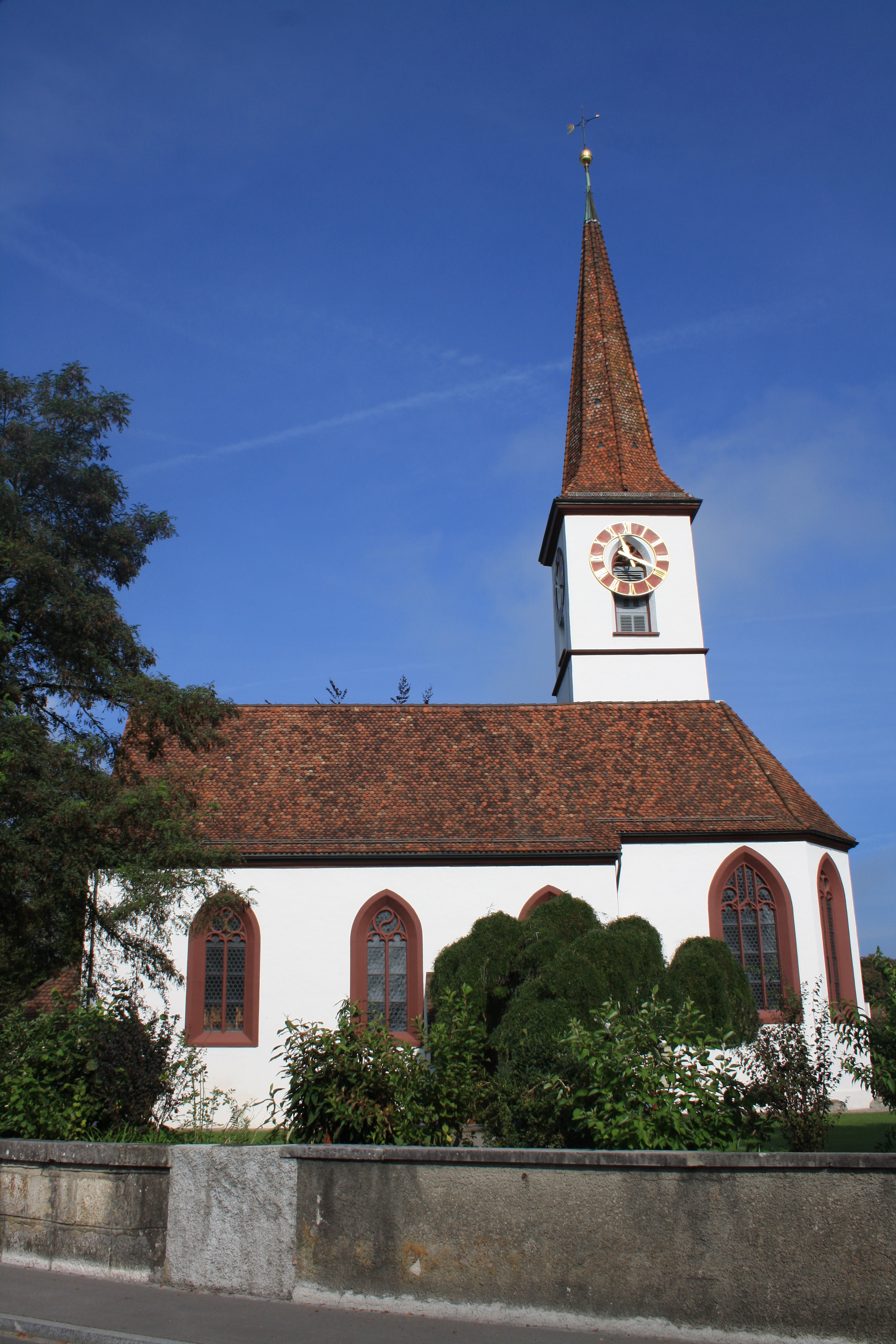 Reformierte Kirche Kölliken